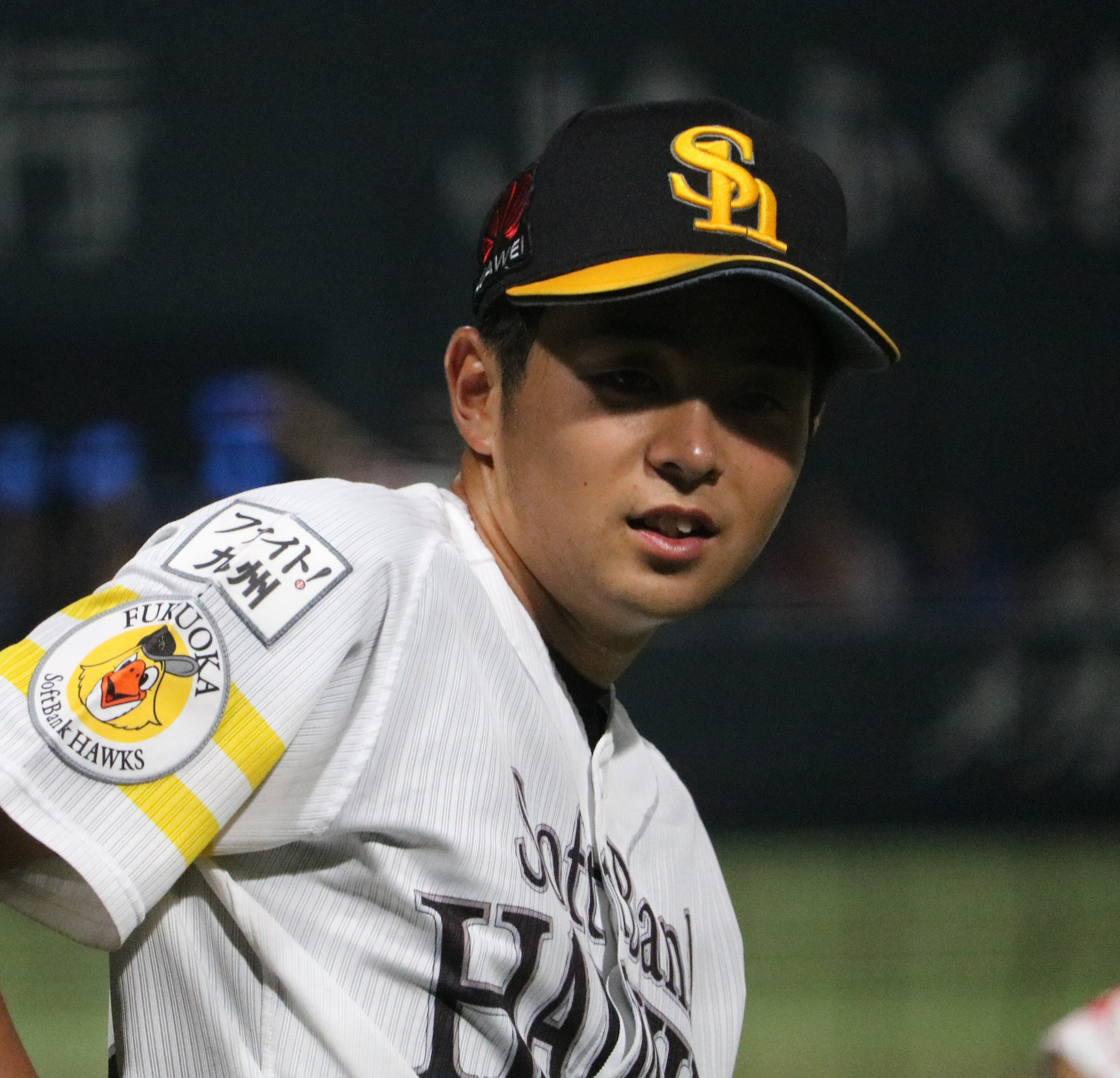 2017/7/28 ウエスタンリーグ